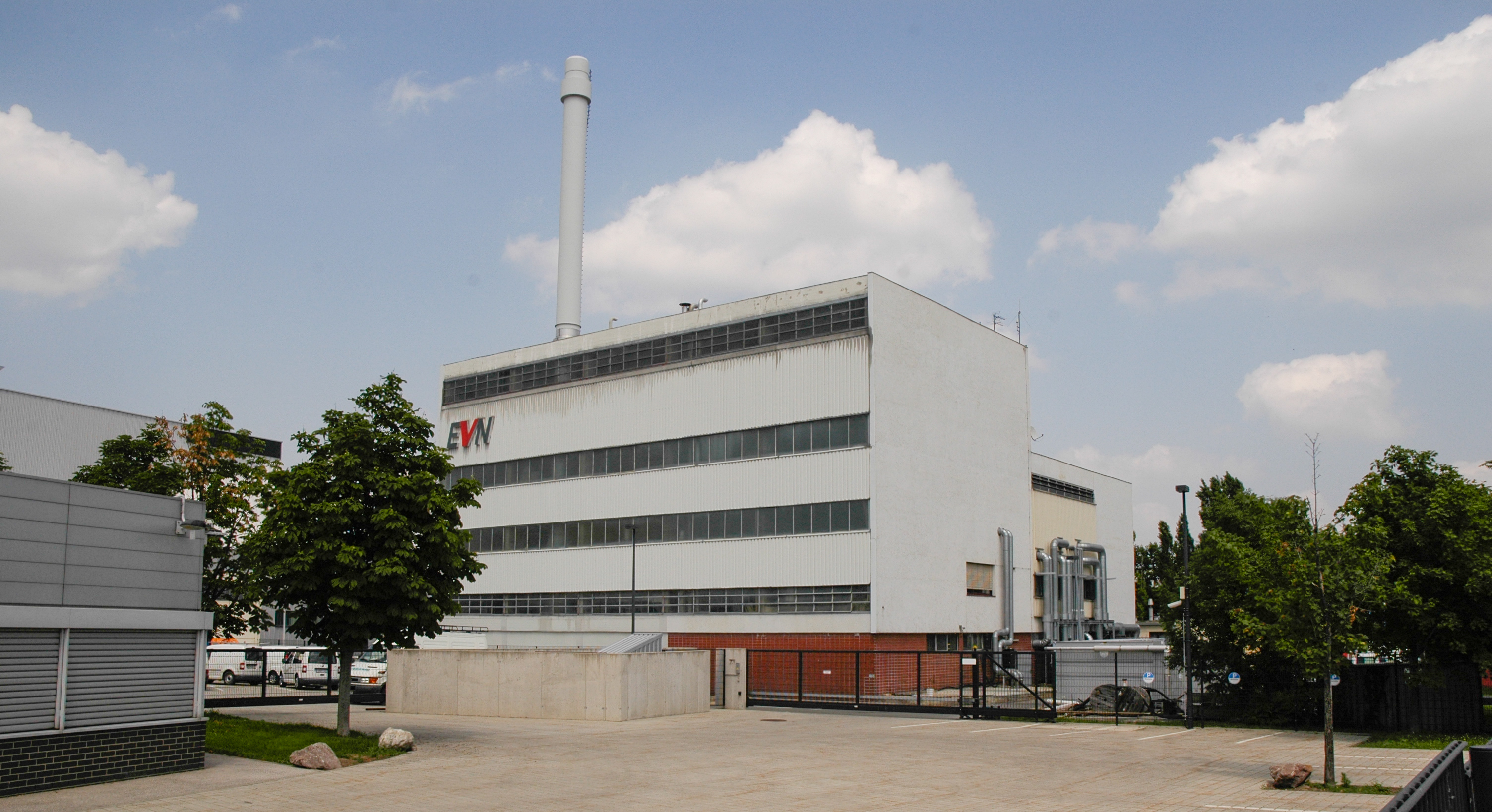 Fernheizkraftwerk Mödling, Altes Werk aus 1960 der EVN Wärme